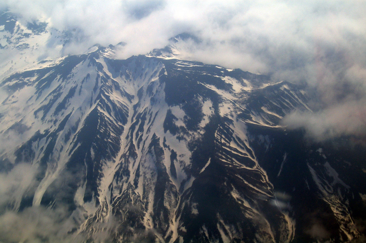 Вулкан Руруй, вид с борта самолета